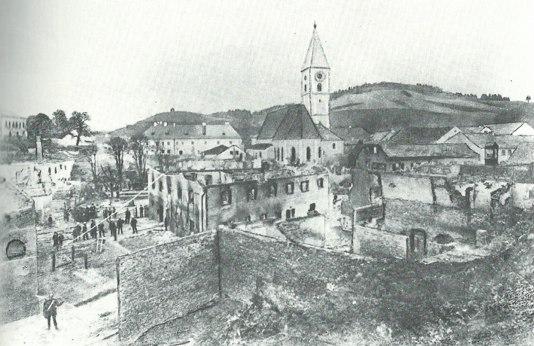 Marktbrand Wörth Donau 1892